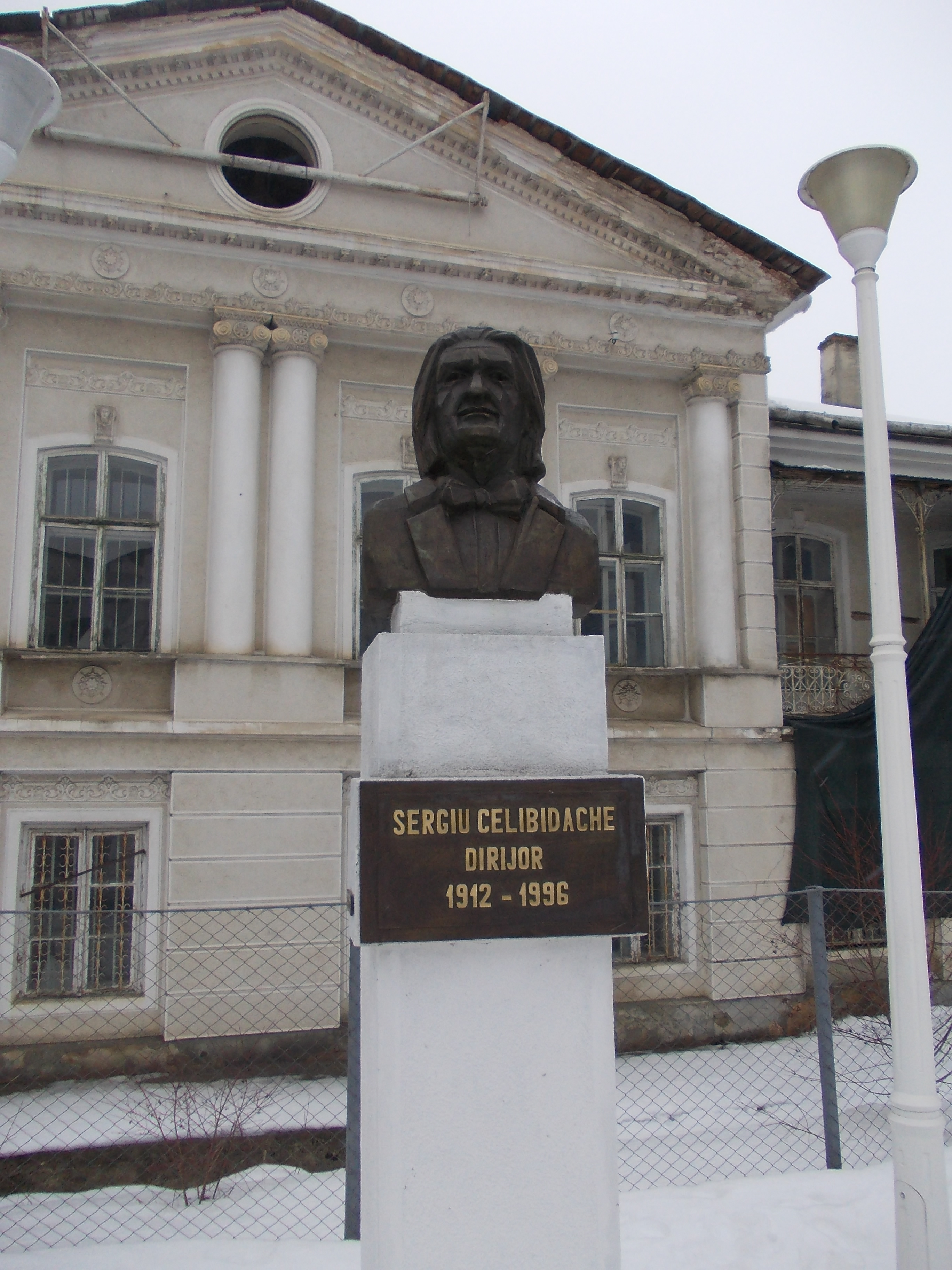 Bustul lui Sergiu Celibidache din faţa casei natale a dirijorului din Roman